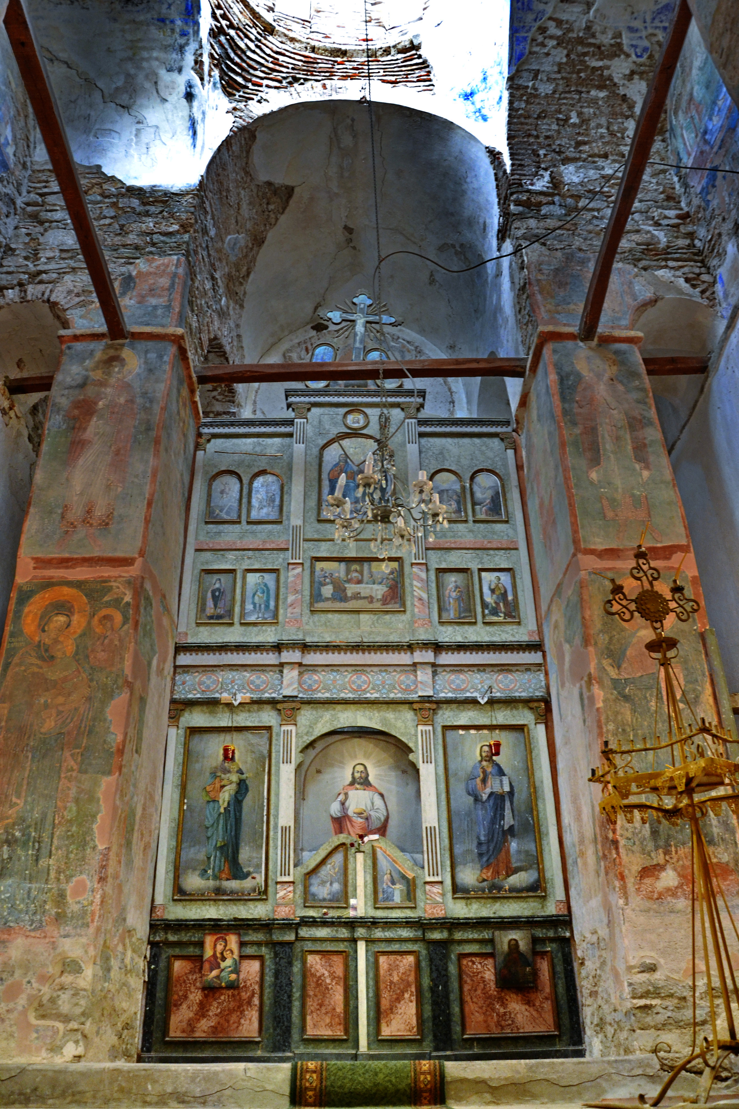 фотографија од иконостасот во манастирот Св.Стефан во с.Конче Радовишко.